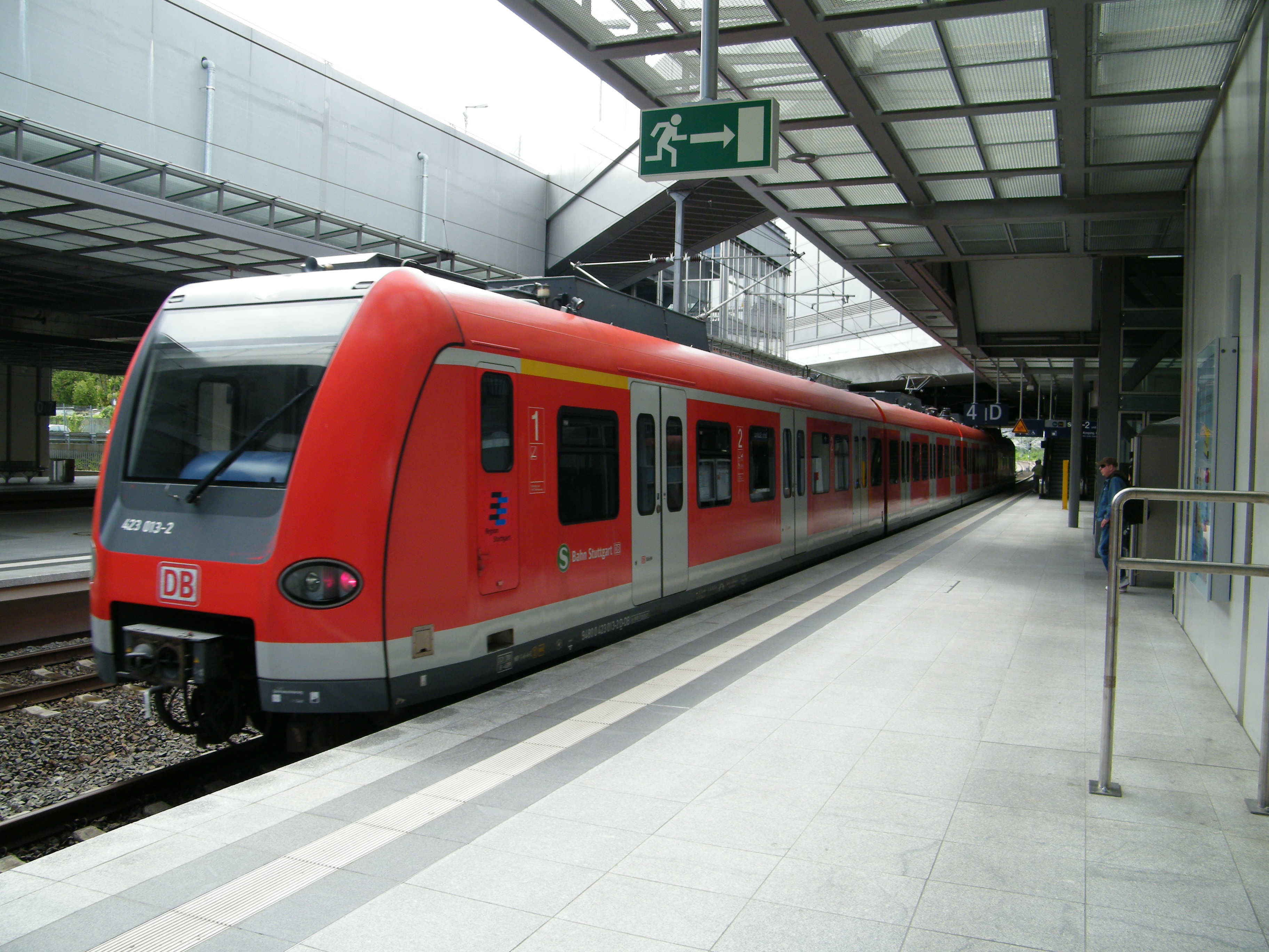 Die Züge der S-Bahnen aus Stuttgart (Bild) und München helfen während der Berliner S-Bahn-Chaostage aus, hier im Bahnhof Berlin-Südkreuz